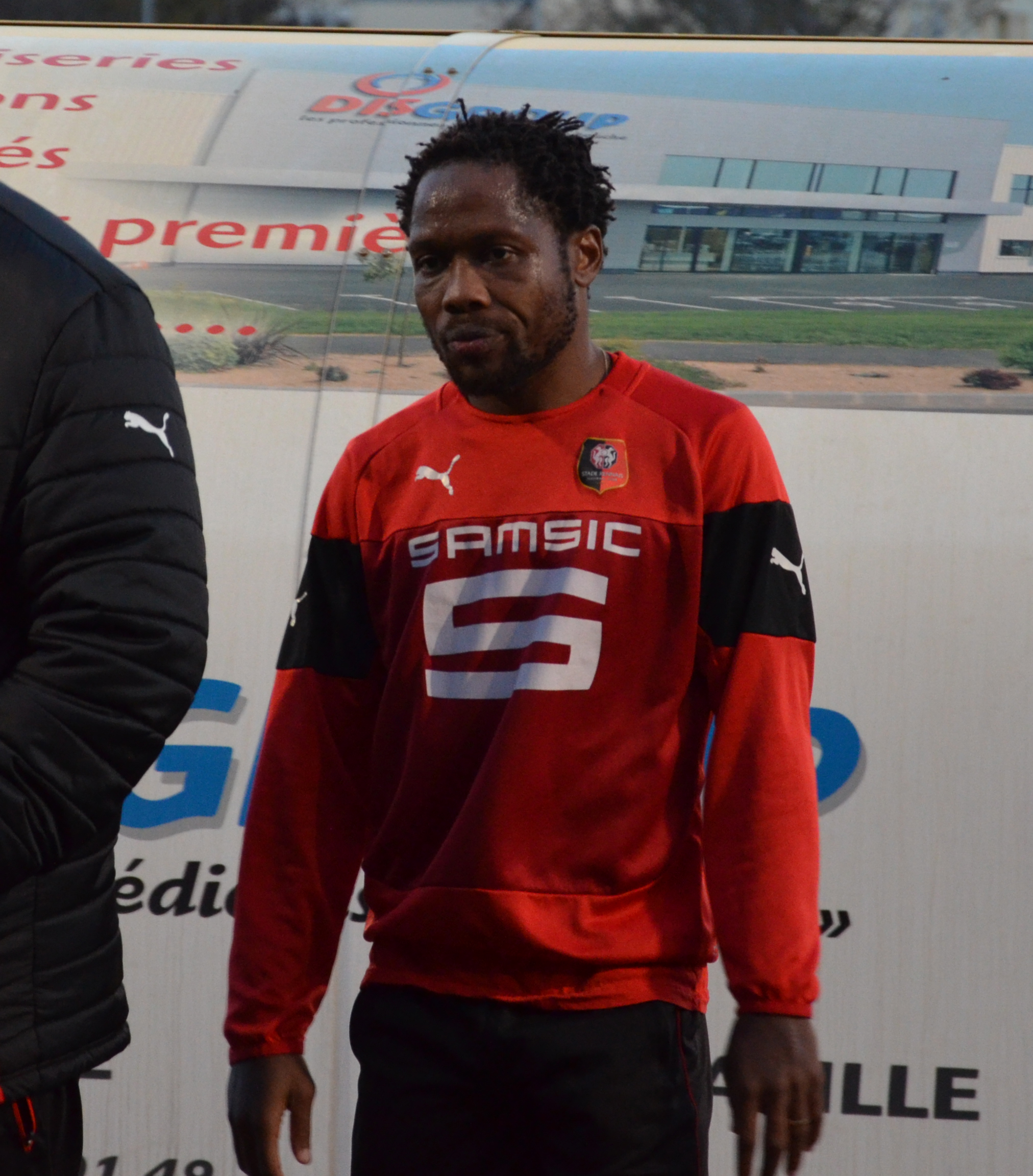 Photographie prise avant la rencontre de CFA2 opposant l'US Granville à la réserve du Stade rennais. Ici, Jean II Makoun.